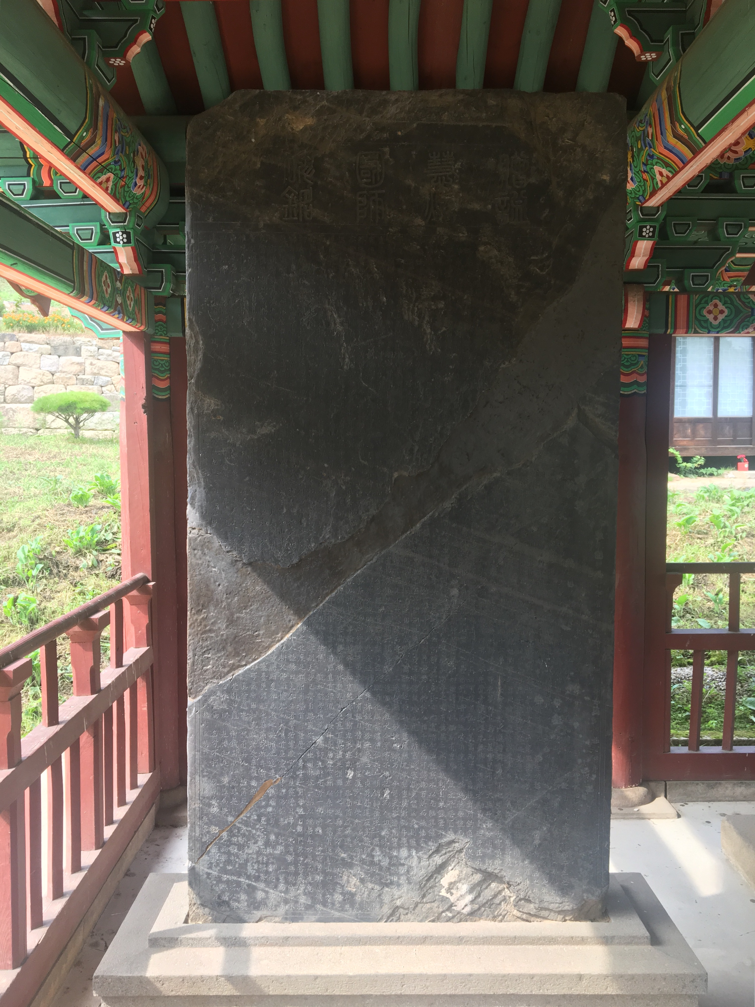 안성 칠장사 혜소국사비